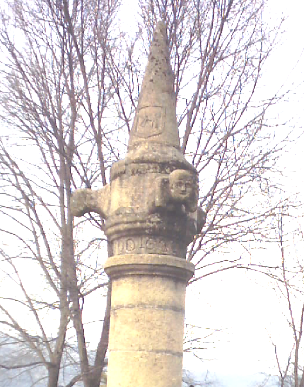 Parte superior de una Picota. Monumento de piedra. El monumento tiene una altura total de aprox 4'5 metros (sin contar la base de 4 escalones), de los que se muestran aproximadamente 2'7 metros. Se ha utilizado brillo y contraste para mejorar las sombras y apreciar ciertos detalles. Al fondo aparece la sierra de Gredos.